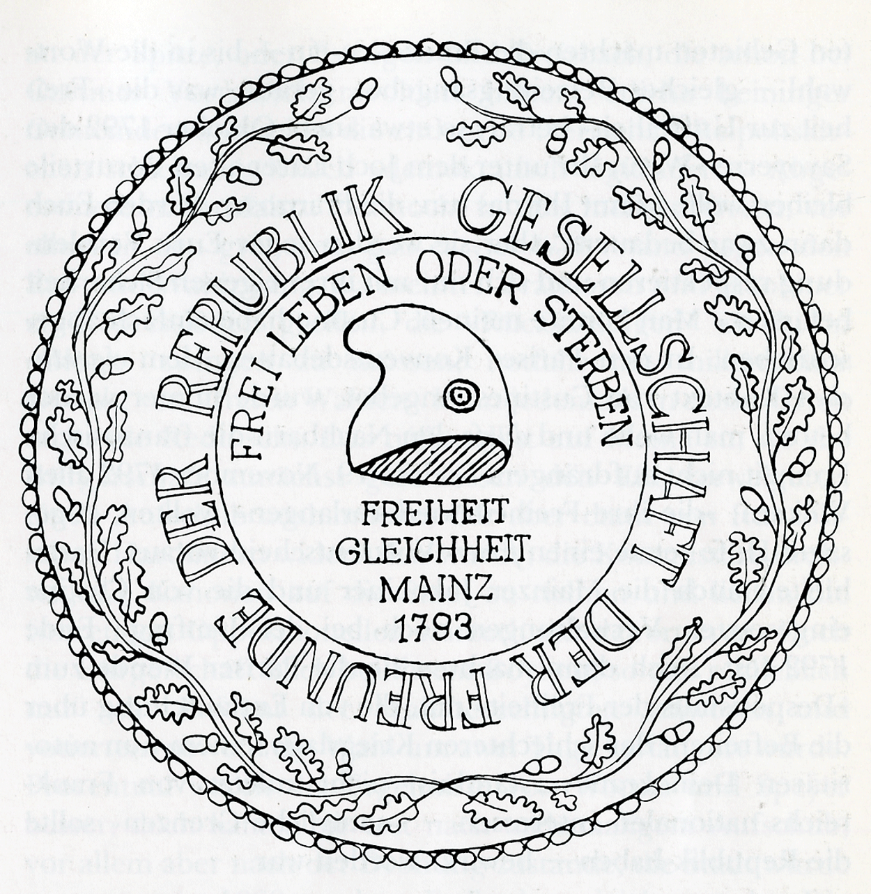 Siegel des zweiten Mainzer Jakobinerklubs. Nachzeichnung von Valy Schmidt-Heinicke